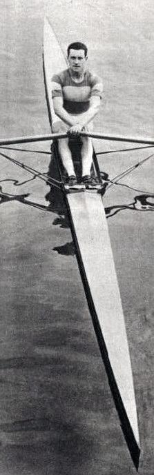 Marc Detton en skuff en 1924.